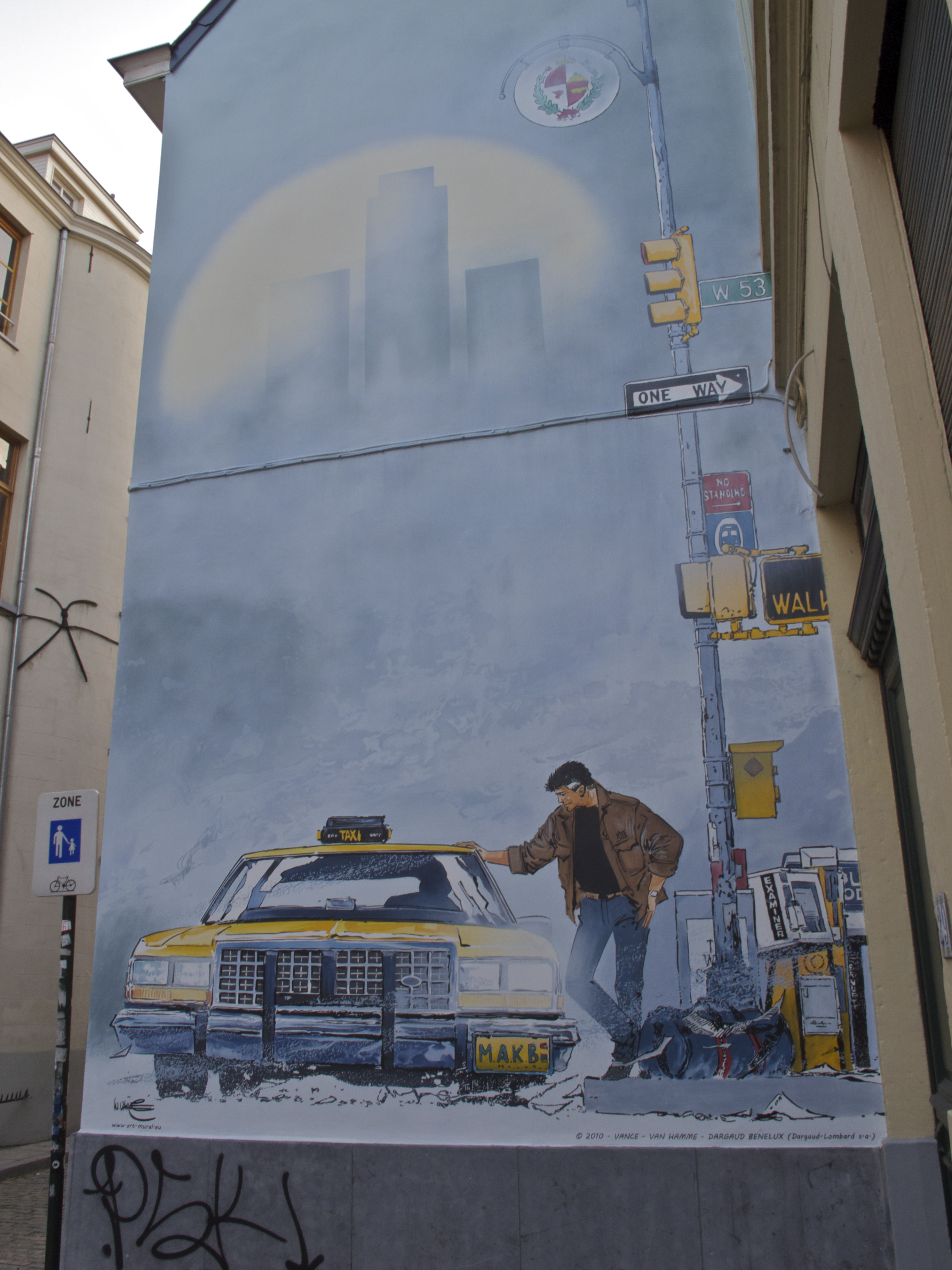 Comicwand XIII in Brüssel, Rue Philippe de Champagne (Parcour BD)